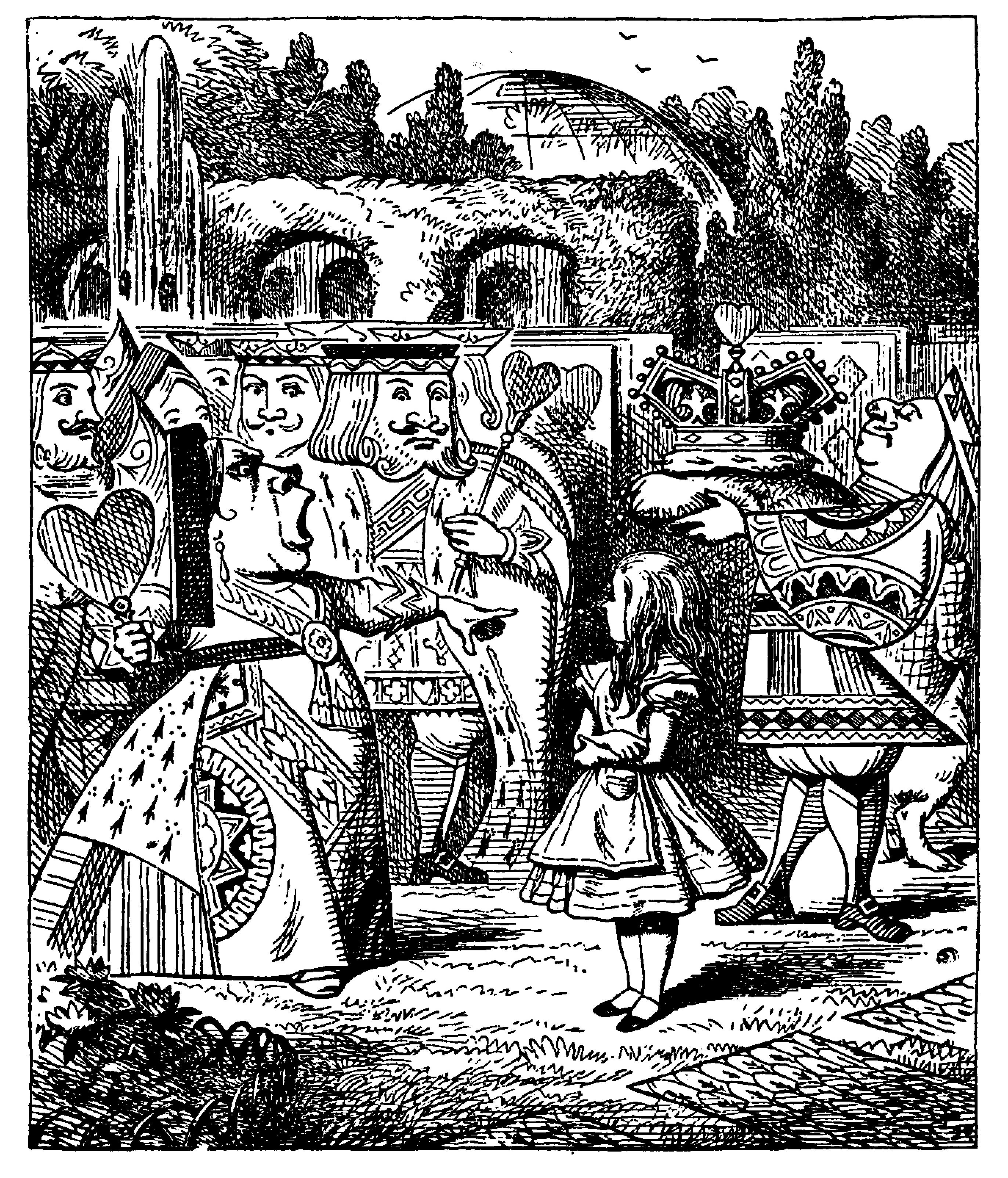 Alice’s Abenteuer im Wunderland Übersetzer: Antonie Zimmermann Orginal Titel: Alice's Adventures in Wonderland Illustrationen: John Tenniel